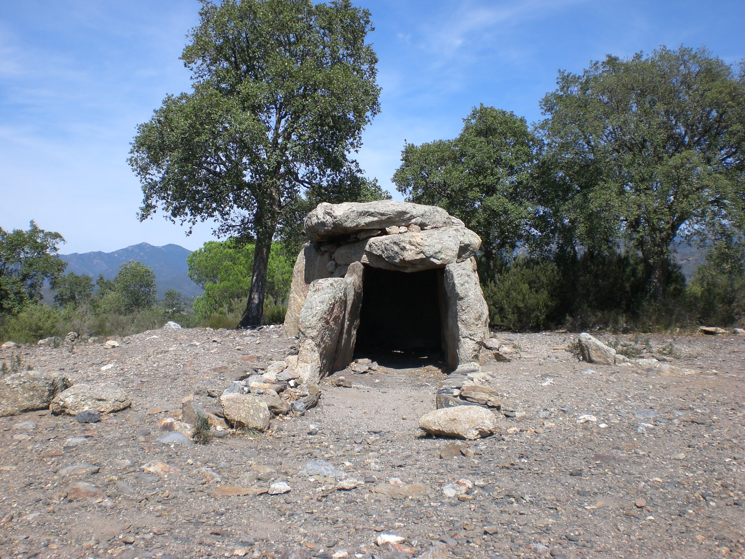 Aragonés: Dolmen de la Cabana Arqueta.